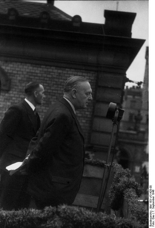 Dittforth spricht Reichsbahnpräsident Dittforth spricht am 7.9. zu den Eisenbahnern der SED in Erfurt. Berlin, den 12.9.46 Abgebildete Personen: Dittforth: Reichsbahnpräsident, SBZ, Deutschland